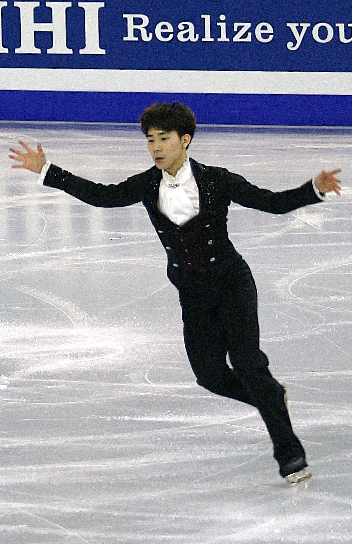 Ли Джун Хен (Южная Корея) на финале Гран-при среди юниоров 2014-2015.